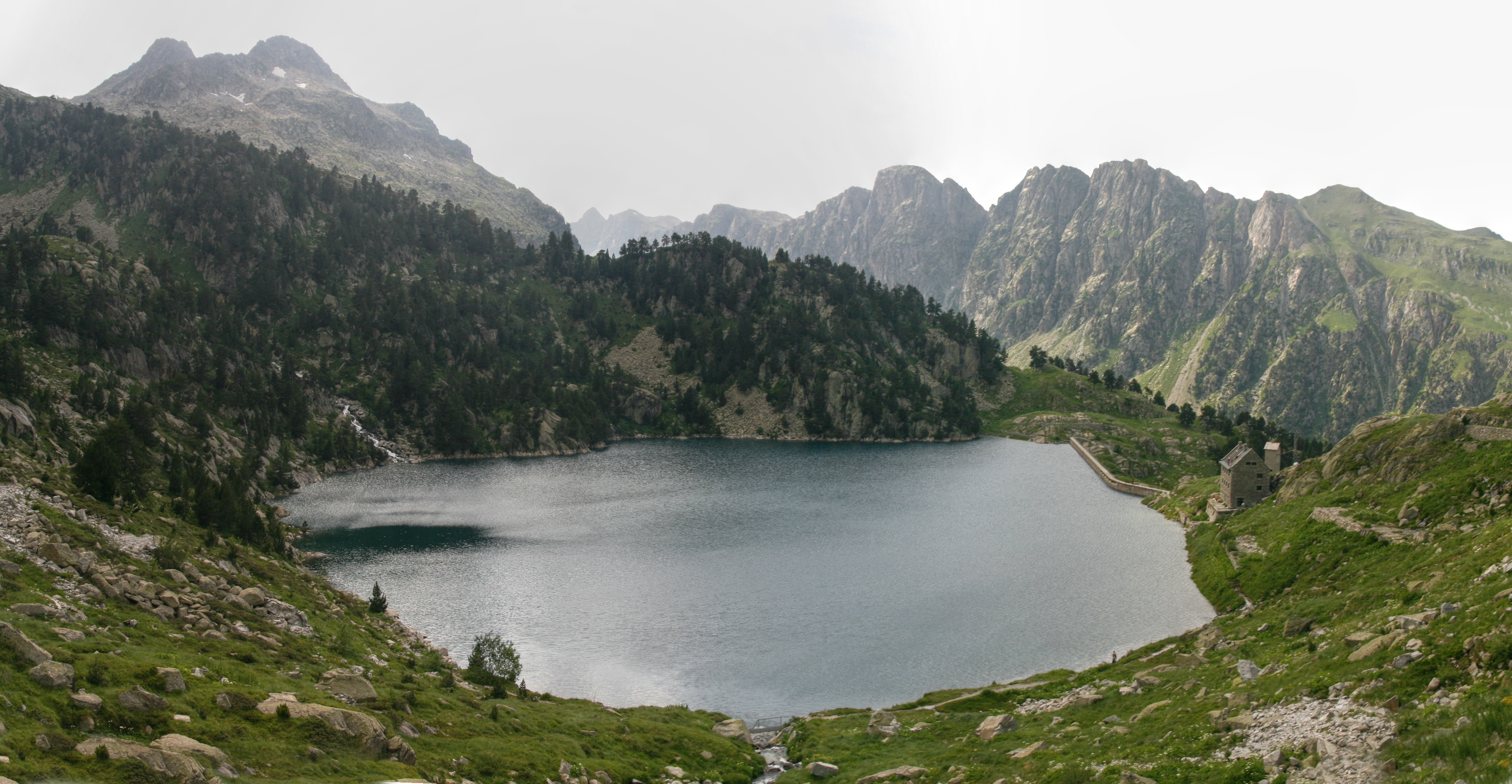 Llac de la Restanca, i presa del Pantà dels Llacs Val d'Aran. Refugi de la Restanca a la dreta del llac.